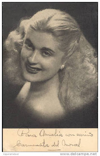 Carmen del Moral